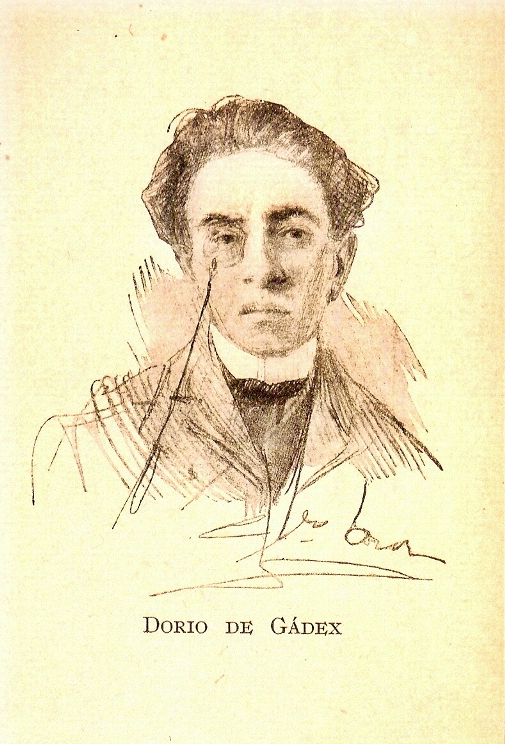 Retrato del escritor Antonio Rey Moliné (Cádiz, 1887 – Madrid, 1924), que firmaba con el seudónimo "Dorio de Gádex".